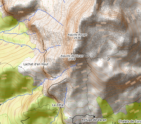 carte réalisée sur umap This map may be incomplete, and may contain errors. Don't rely solely on it for navigation.